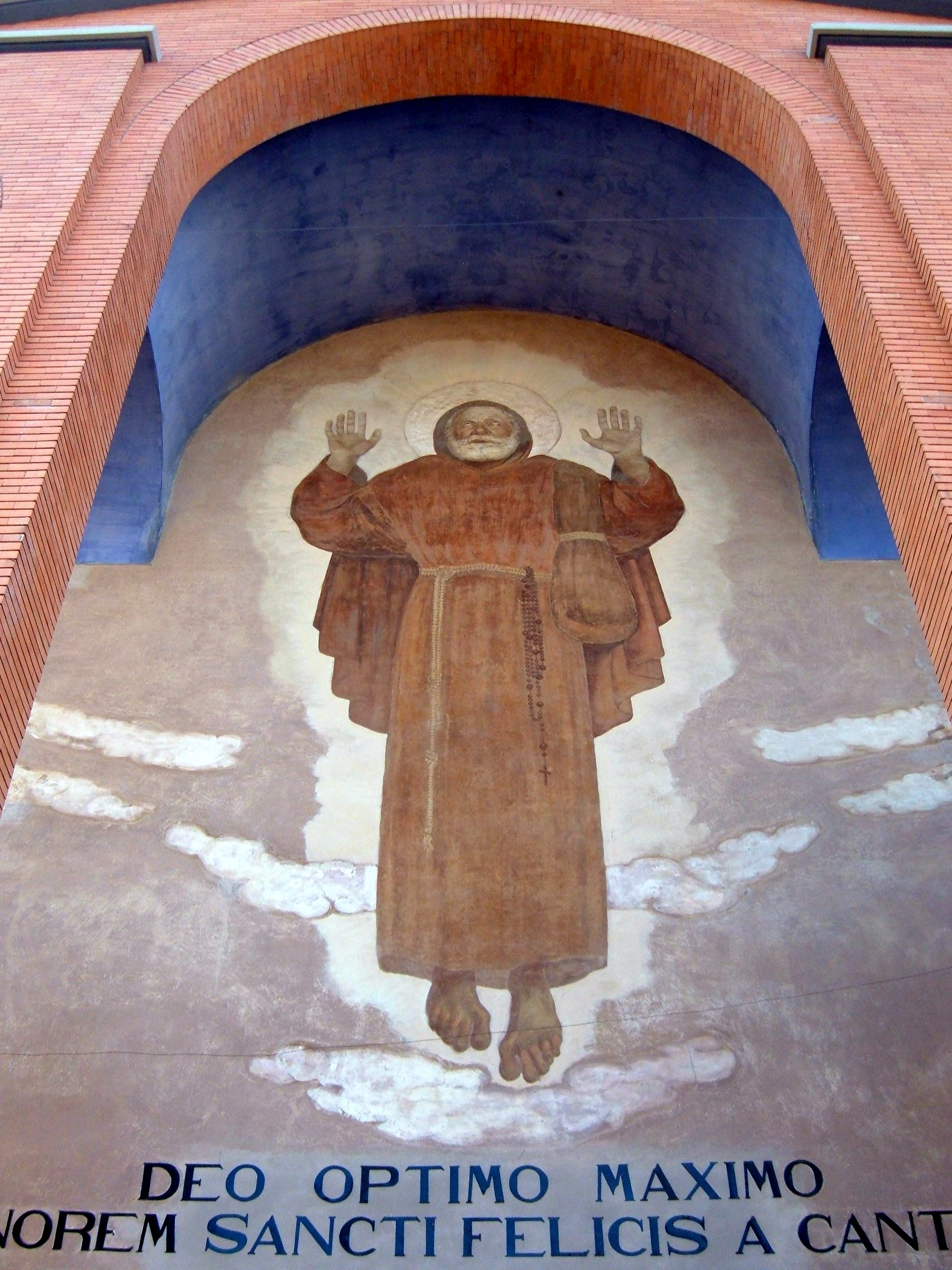 Chiesa di San Felice da Cantalice, a Roma, nel quartiere Prenestino-Centocelle.